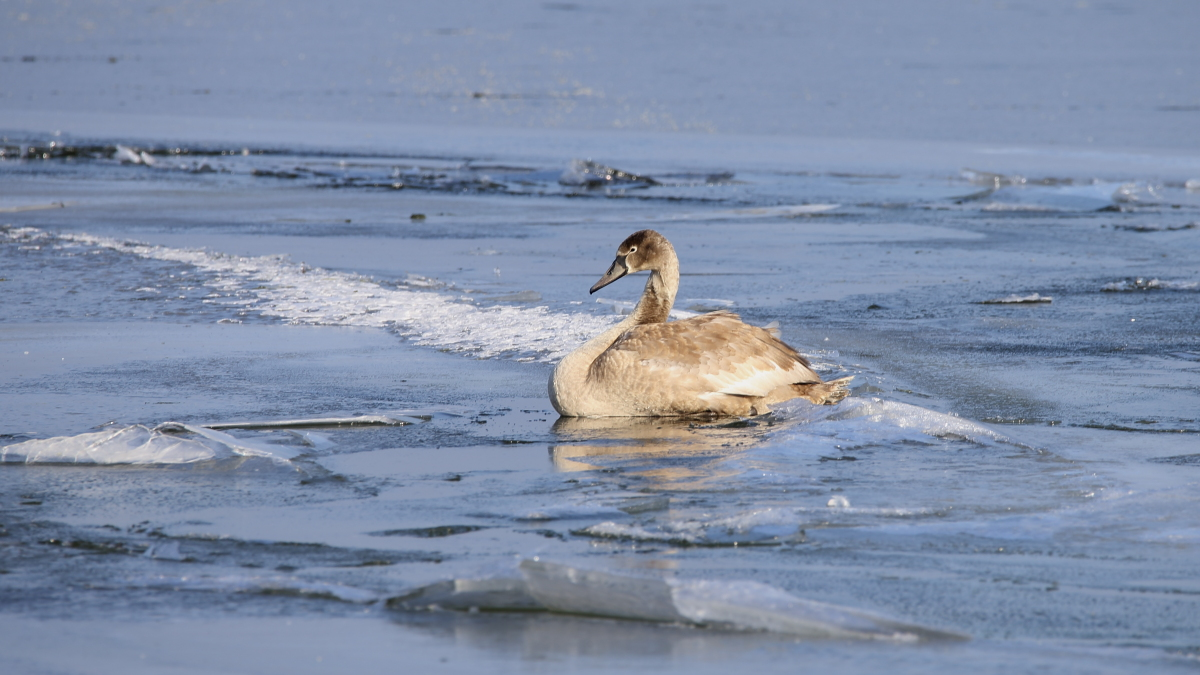 Festgefrorener Höckerschwan auf der Müritz